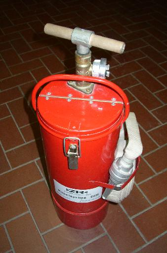 Kübelspritze